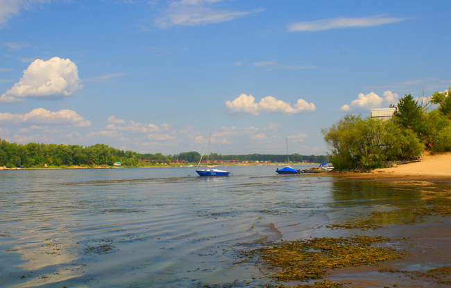 Рождественский остров, Поджабный остров, Проран остров — берег острова со стороны Воложки напротив села Рождествено